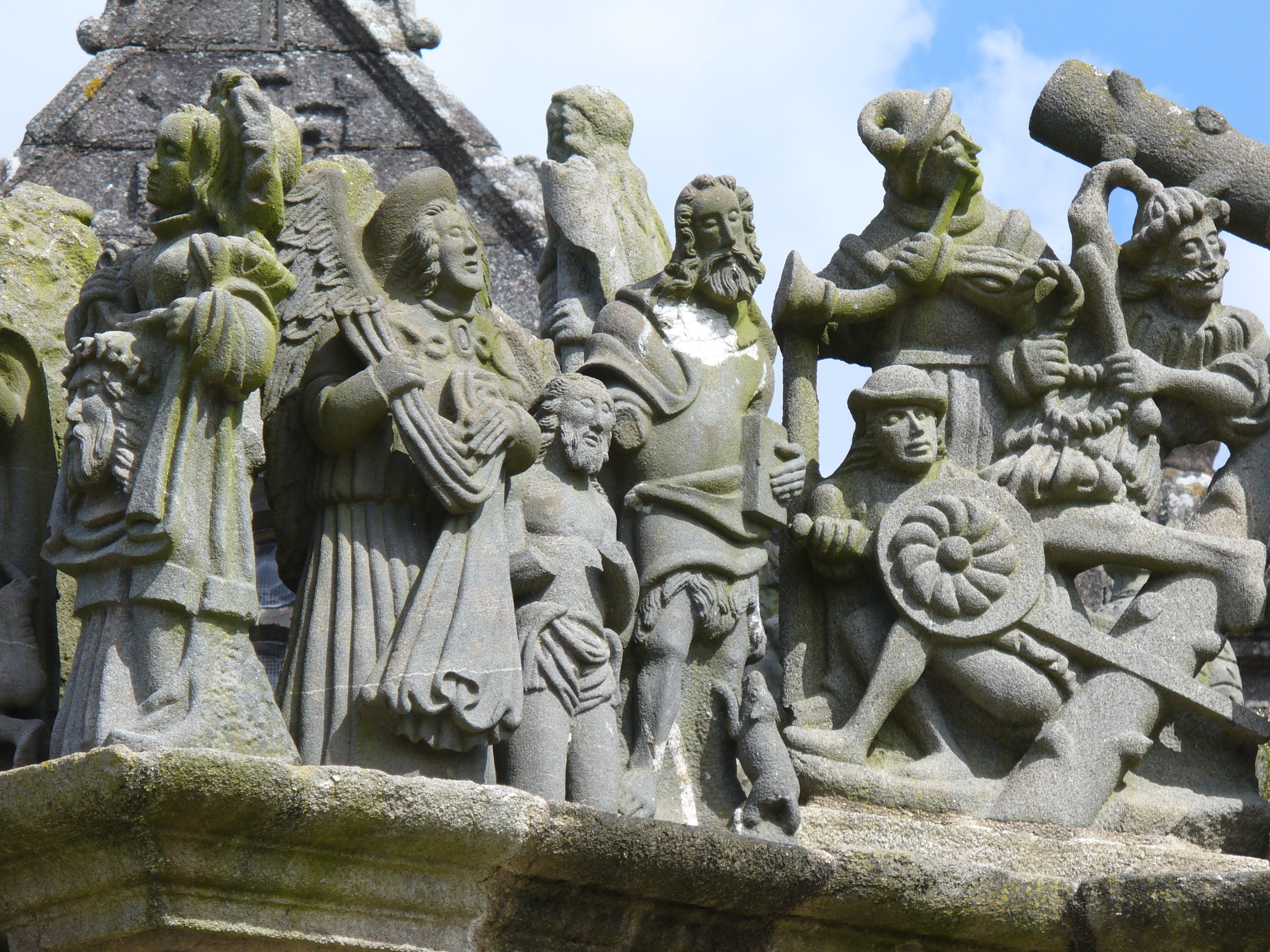 Calvaire-Kalvarienberg von Saint Miliau in Guimiliau zwischen 1581 und 1588 errichtet zeigt mit insgesamt 200 Figuren 17 Passionsszenen im Turm und im Fries 15 Szenen aus dem Leben Jesu